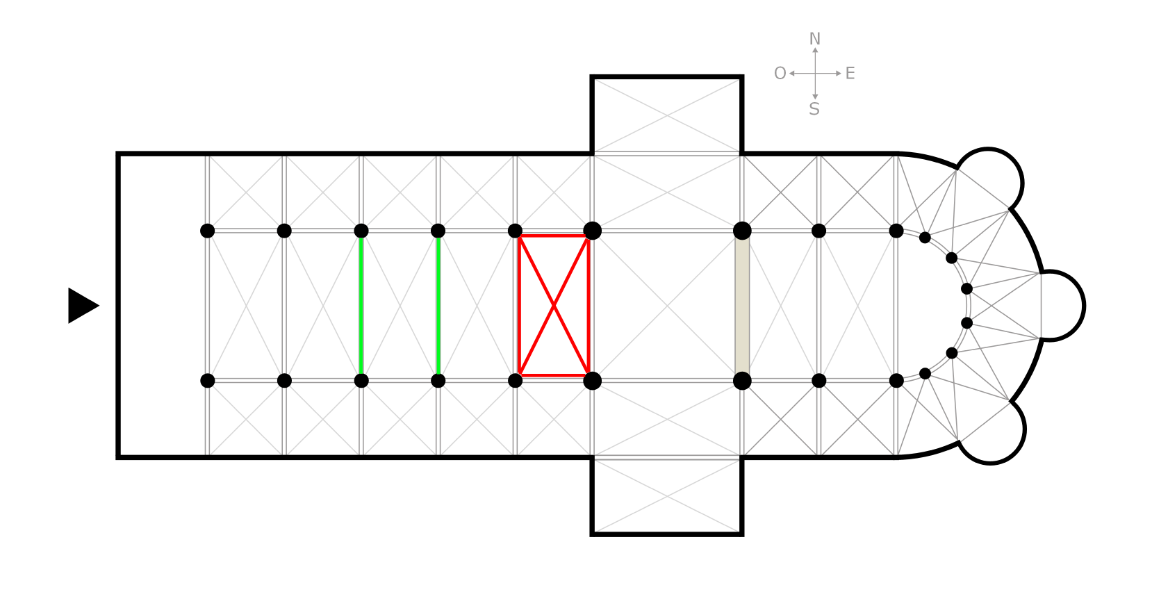 Kerkplattegrond gordelboog en travee